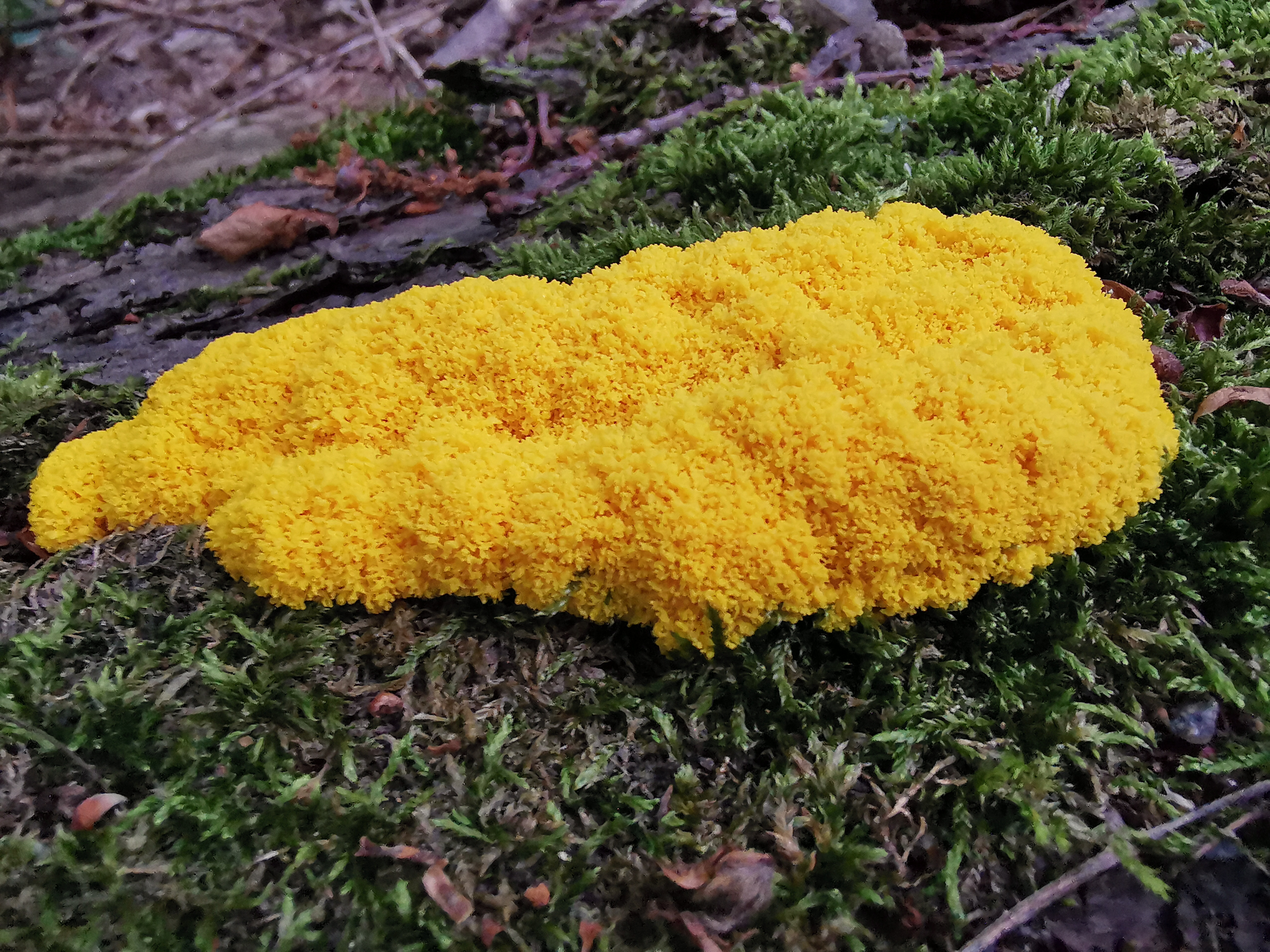 Fuligo septica (Gelbe Lohblüte) auf einem abgestorbenen Baumstamm.